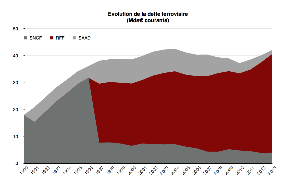 Graphique montrant la dette ferroviaire française entre 1990 et 2013